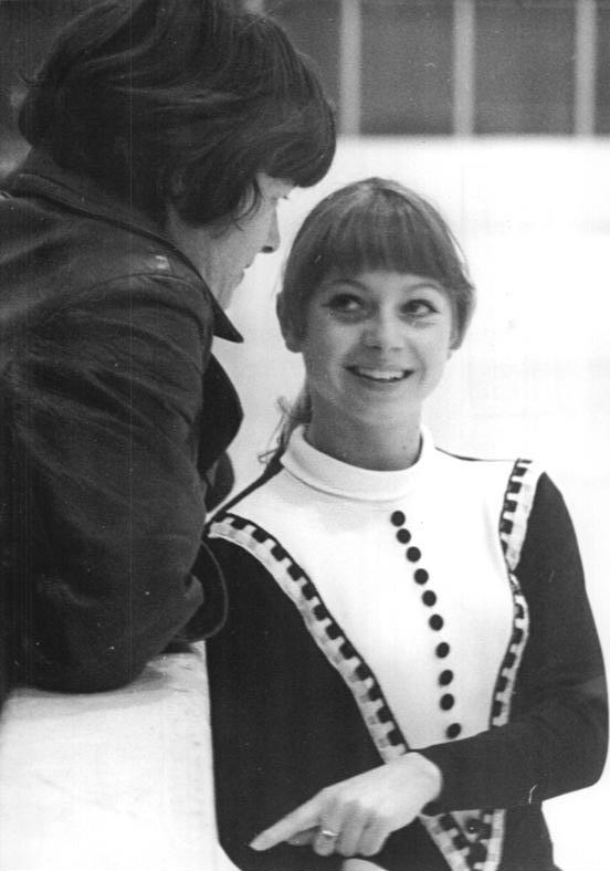 Sonja Morgenstern, Jutta Müller Zentralbild Wendorf-27.11.70 Berlin: Jugendwettkämpfe der Freundschaft im Eiskunstlaufen in der Berliner Dynamo-Eishalle. Nach den ersten Pflichtfiguren der Damen-Konkurrenz liegt die Favoritin Sonja Morgenstern (DDR) bereits in Führung. Hier in einer Wettkampfpause mit ihrer Trainerin Jutta Müller. Abgebildete Personen: Morgenstern, Sonja: Eiskunstläuferin, Olympiateilnehmerin 1968 und 1972, DDR Müller, Jutta: Eiskunstlauftrainerin, DDR